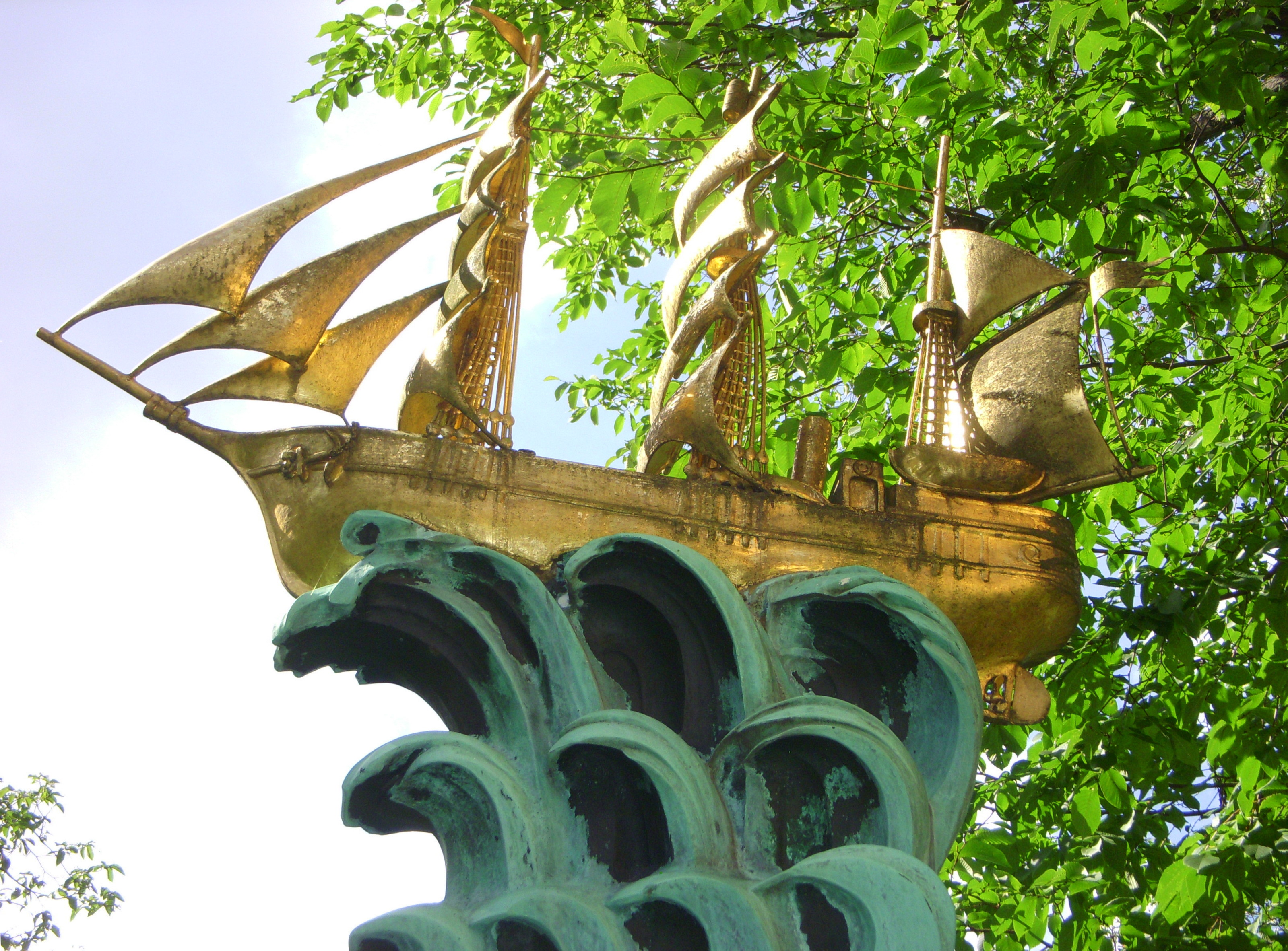 Vegamonumentet vid Stockholms gamla observatoriet av Ivar Johnsson